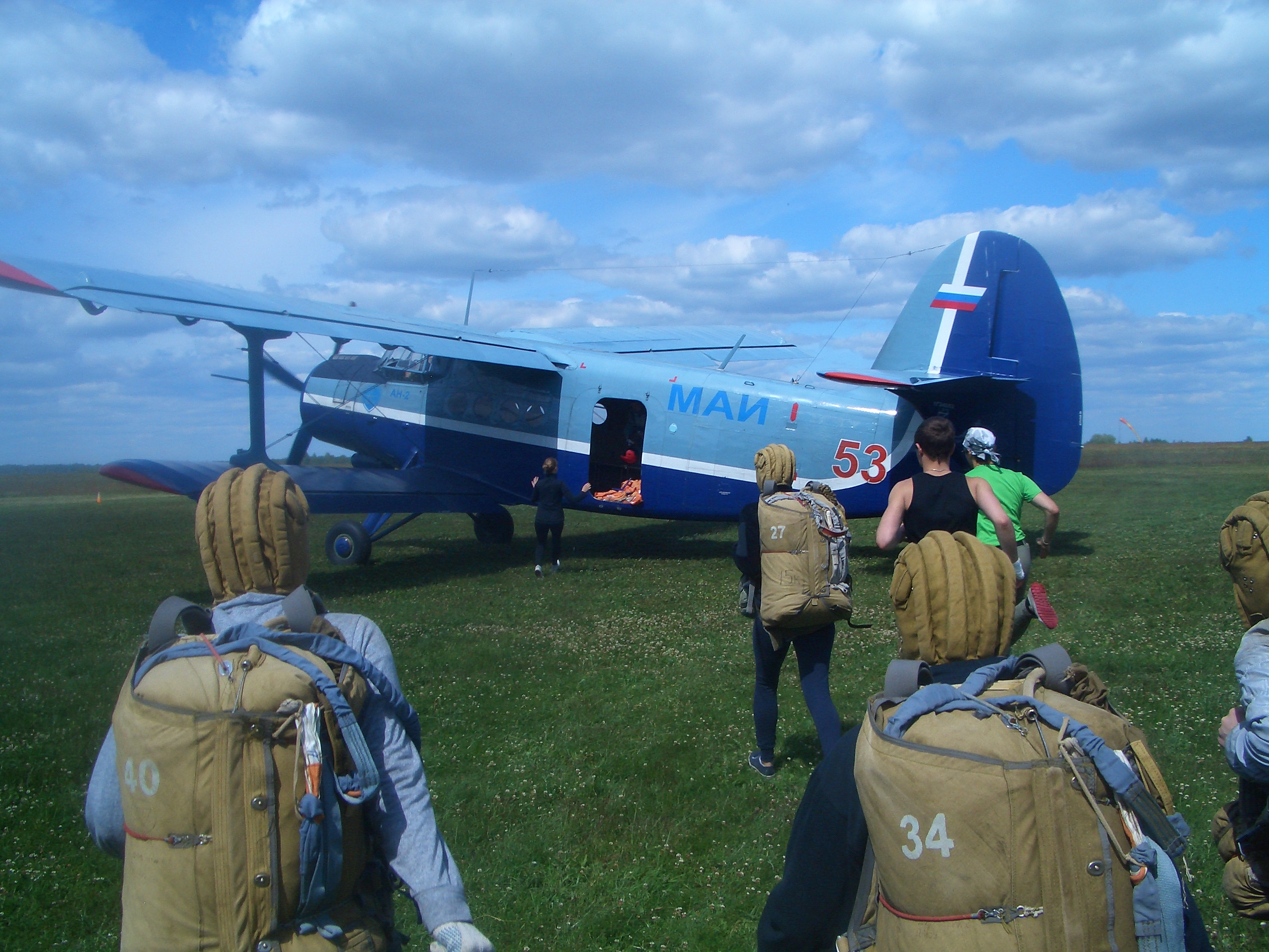 Ан-2ТД на аэродроме Алферьево